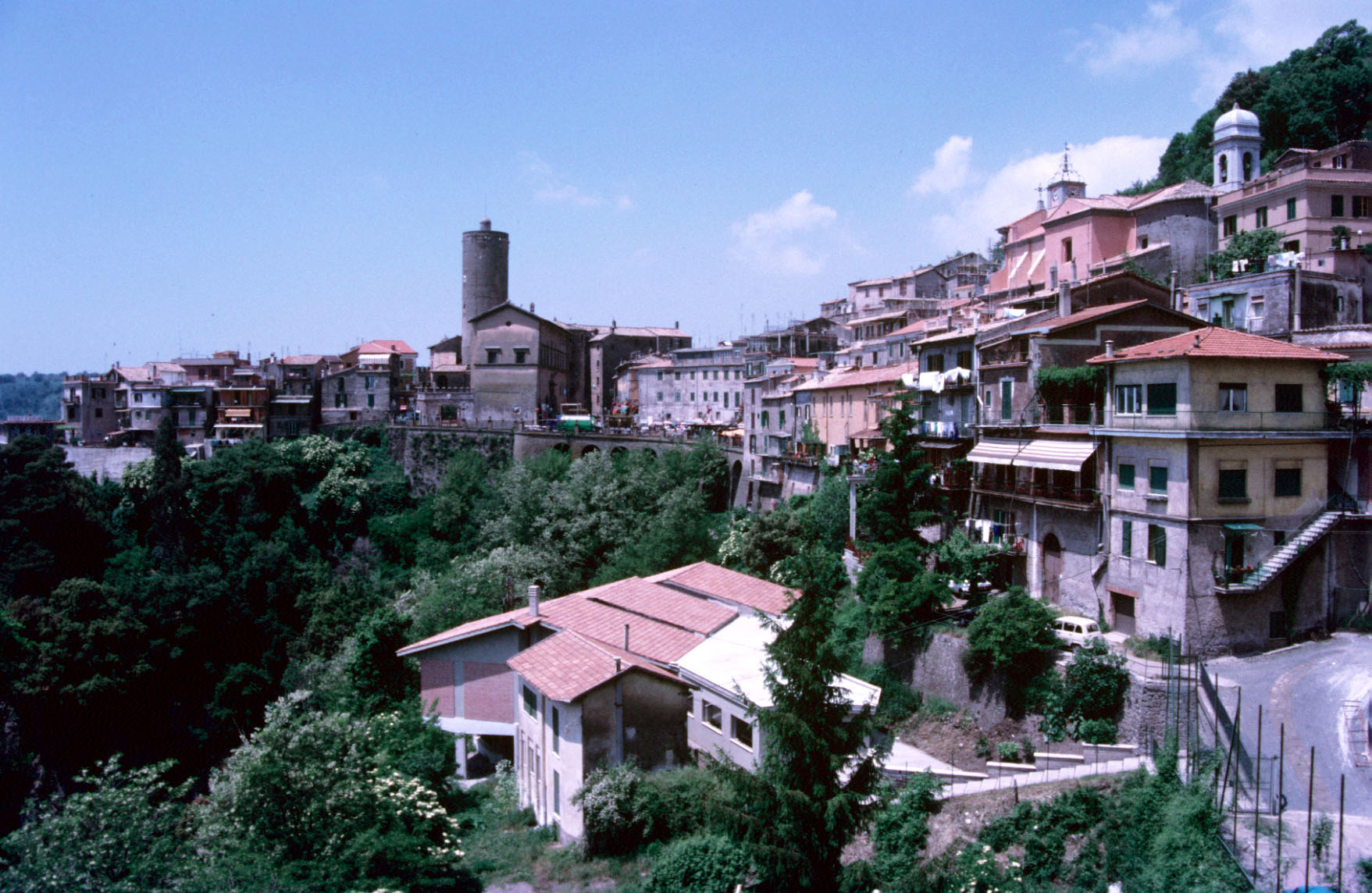 Nemi panorama 1986